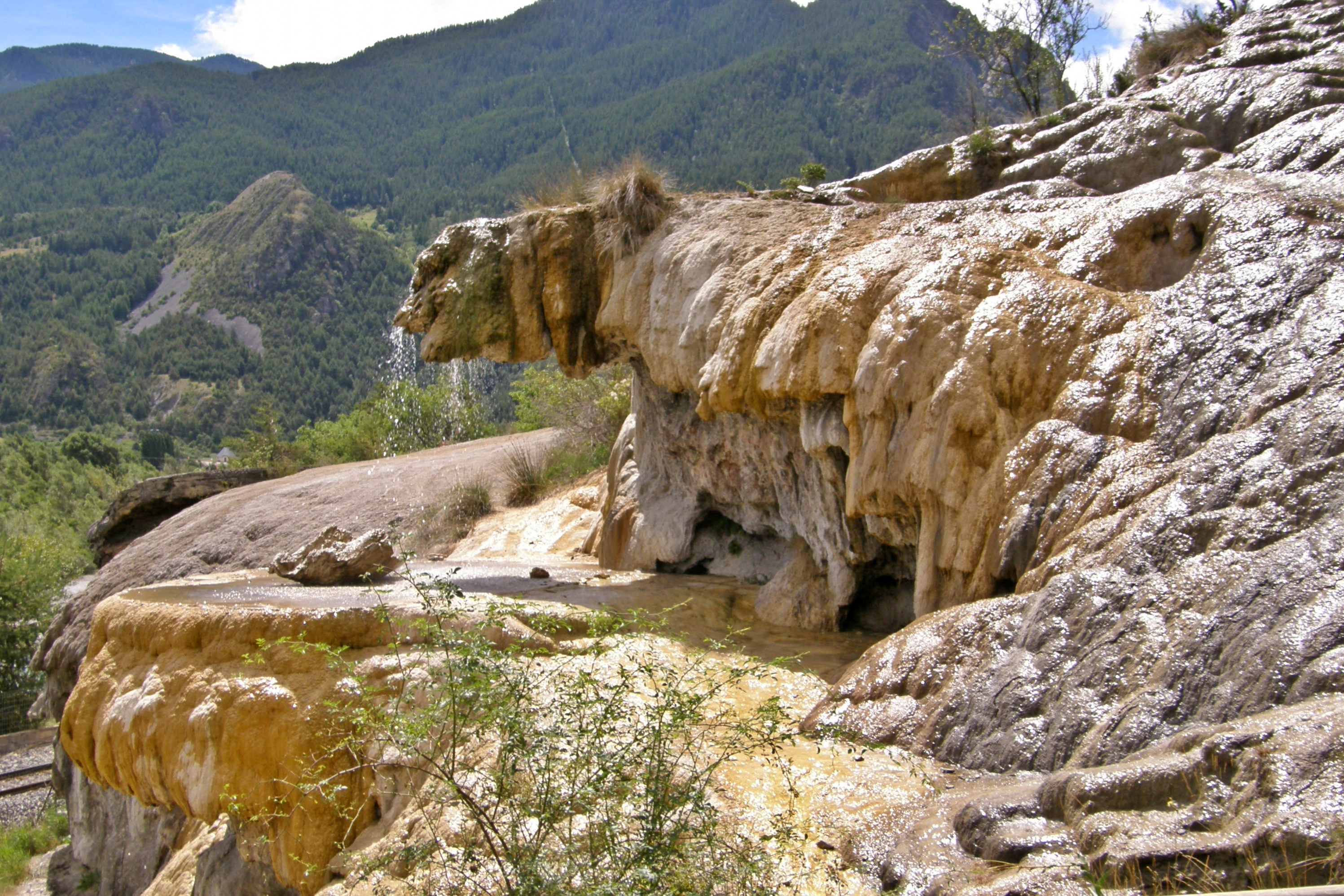 Fontaine pétrifiante de Réotier alimentée par les eaux de la Salce, département des Hautes-Ales, France